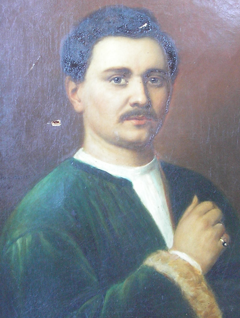 Portrait huile sur toile d'Ismaël très jeune. Date inconnue.